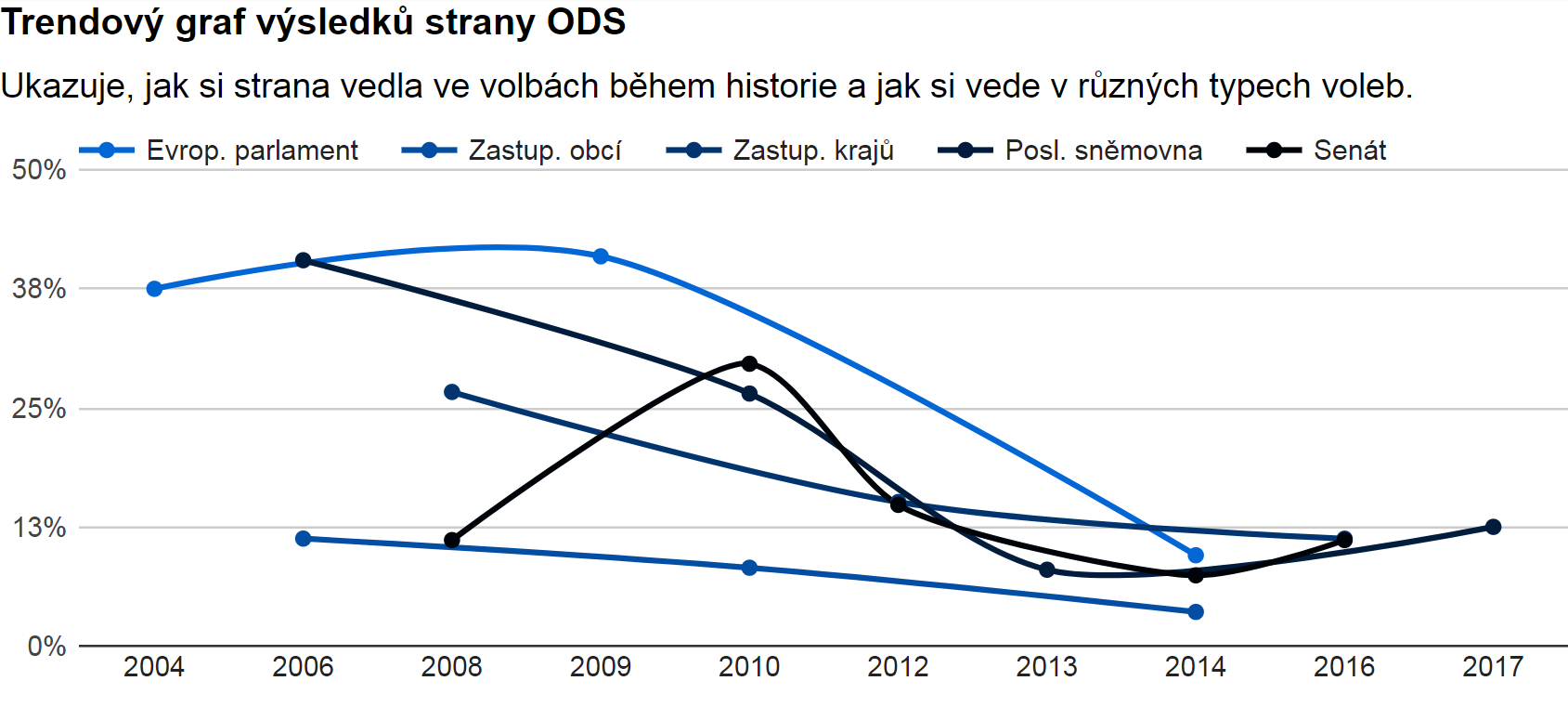 ODS - Výsledky voleb, získané mandáty, trendy od 2004 do 2017. Poslanecká sněmovna, senát, kraje, obce, evropský parlament.